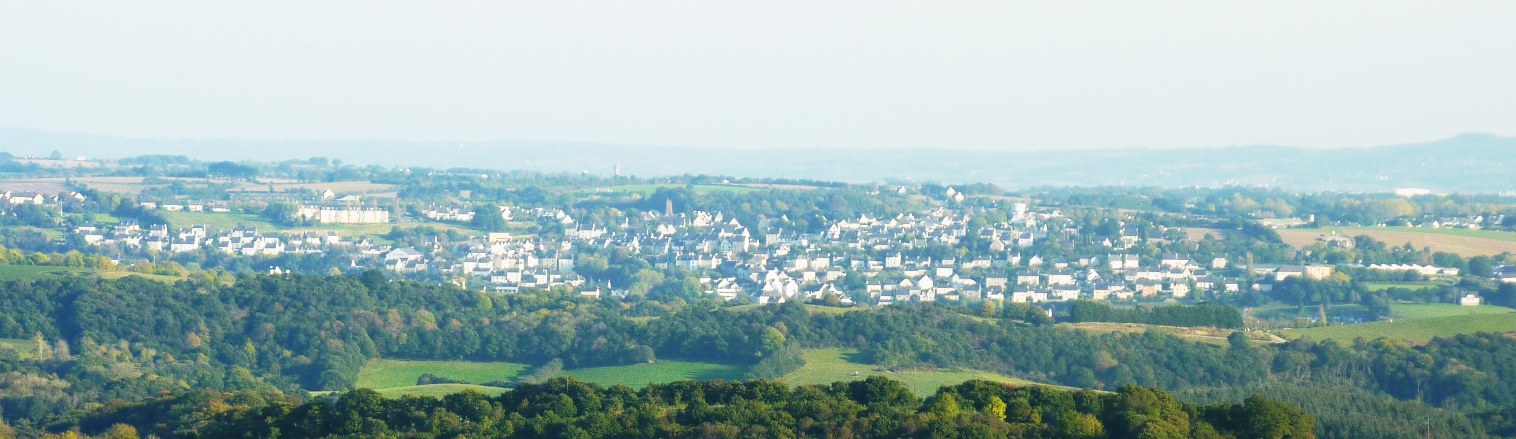 Le Faou : vue panoramique depuis la route Rosnoën-Quimerch